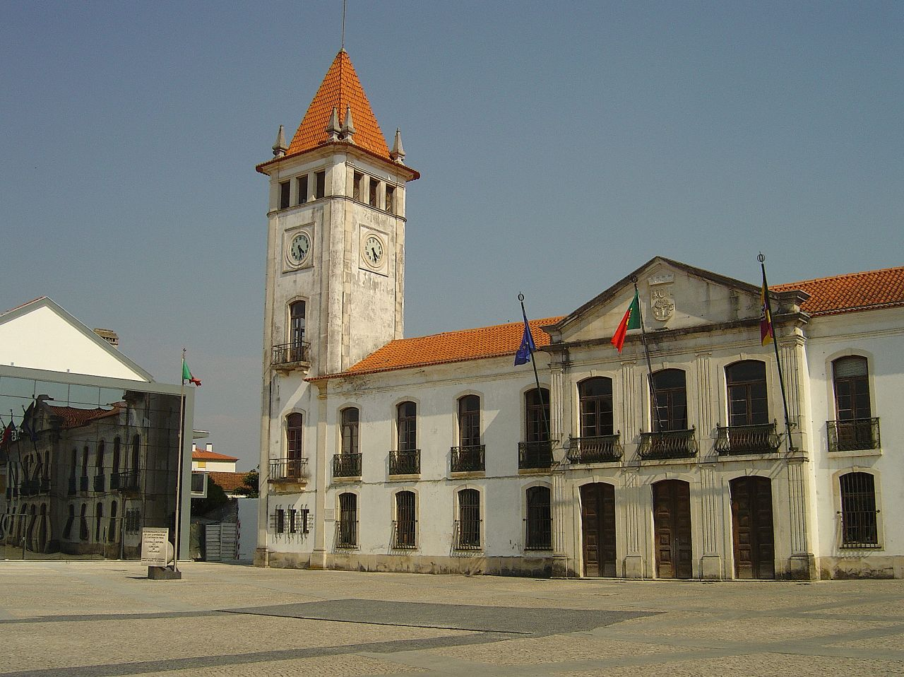 Cantanhede